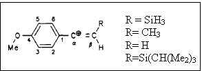 Cátions_1-(p-nisil)vinil_beta_substituídos_investigados_por_Siehl_et._al